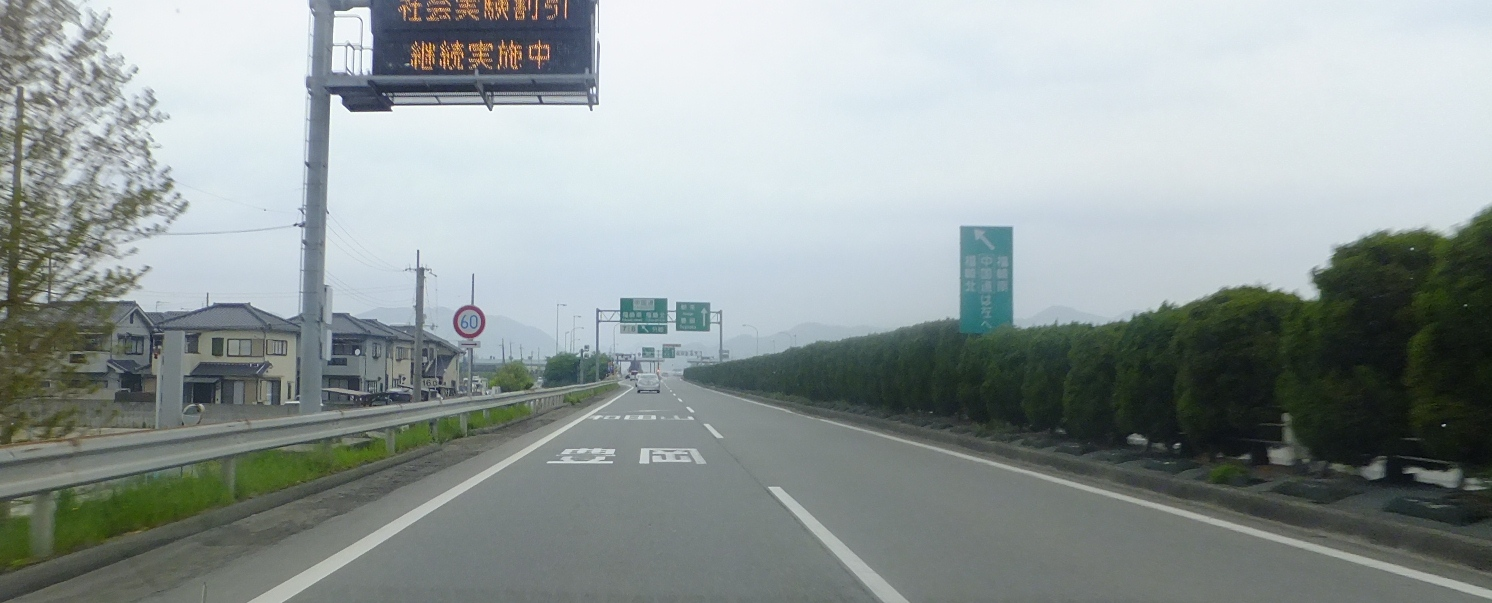 兵庫県神埼郡福崎町南田原 播但連絡道路